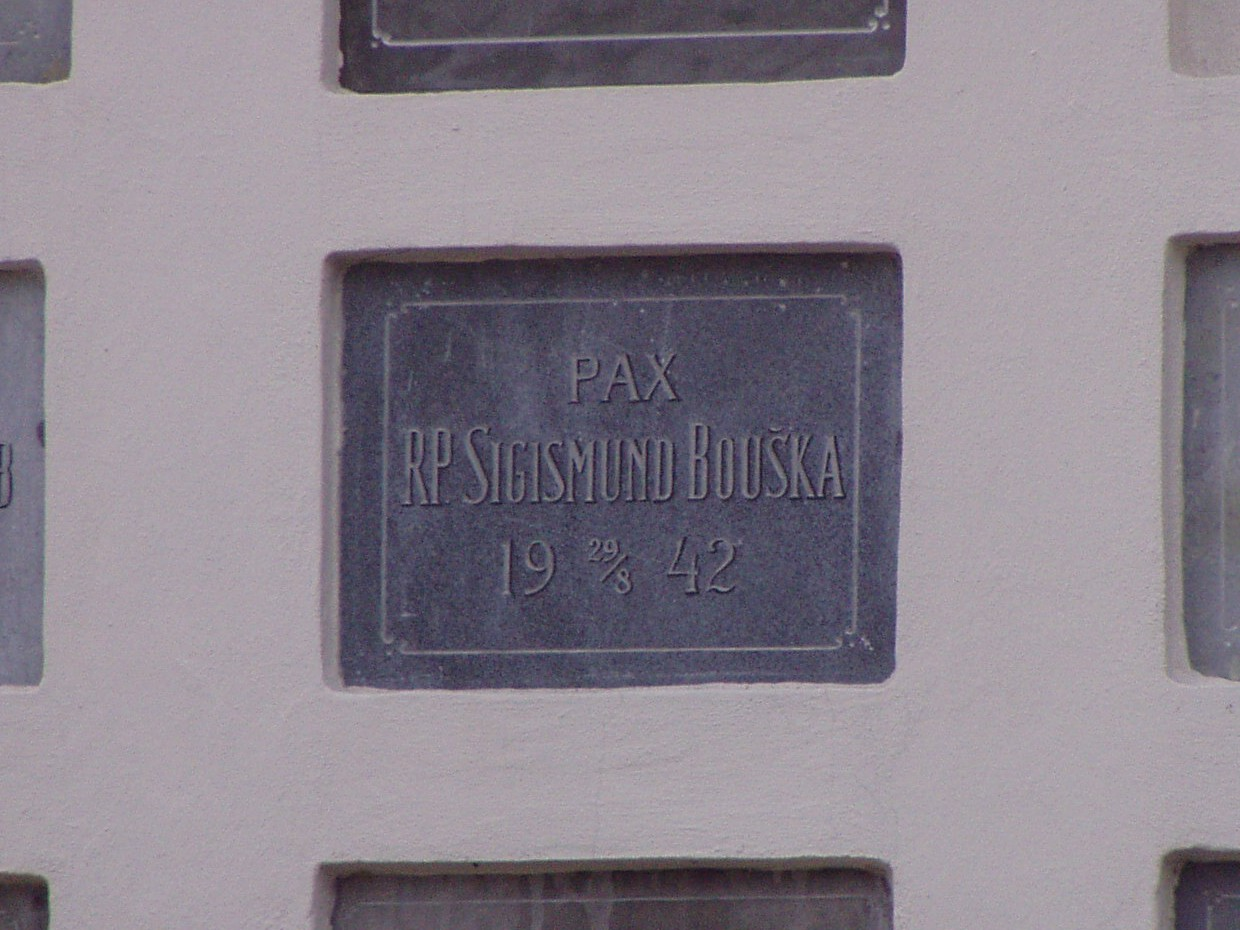 Deska se jménem Sigismunda Boušky na benediktinském řádovém pohřebišti břevnovského hřbitova